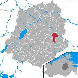 Golchen, Landkreis Demmin, Mecklenburg-Vorpommern